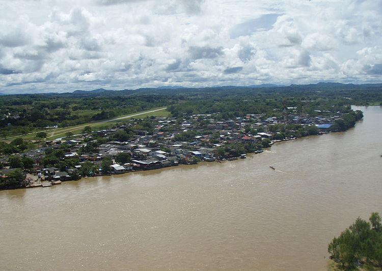 El Bagre-Antioquia